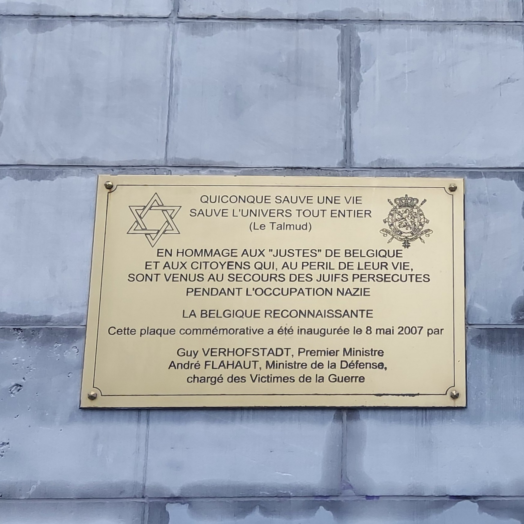 Plaque déposée sur les escaliers du Mont des Arts en hommage aux Justes parmi les Nations de Belgique.